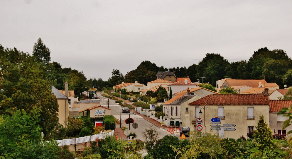 Le bourg.